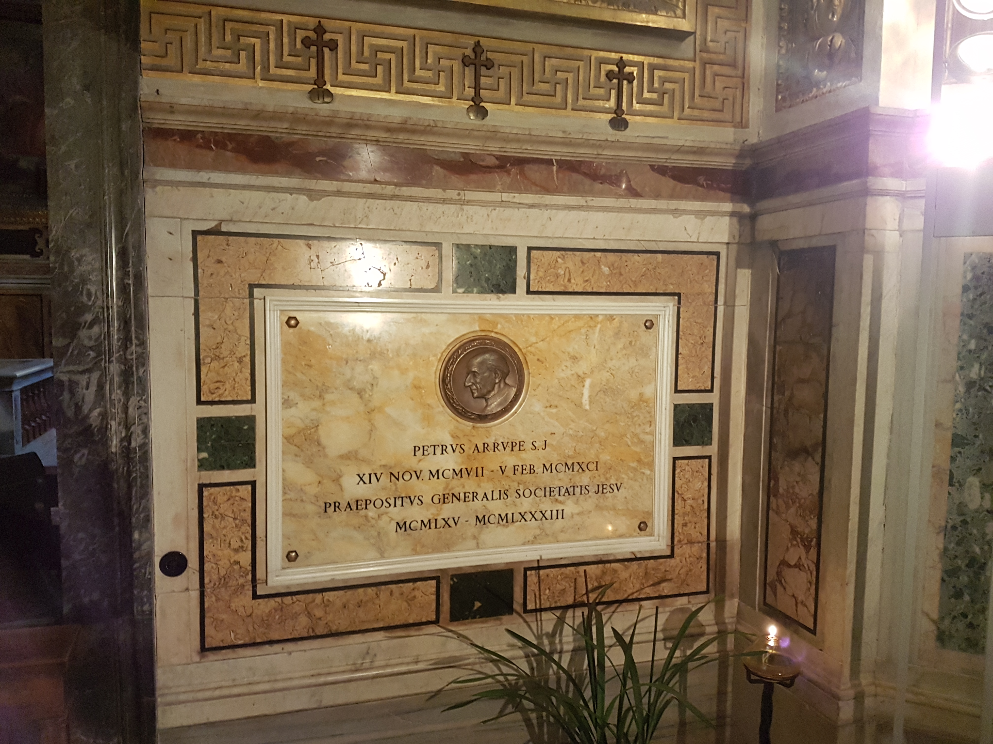 Grabplatte von Pater Pedro Arrupe in der Kirche Il Gesu zu Rom